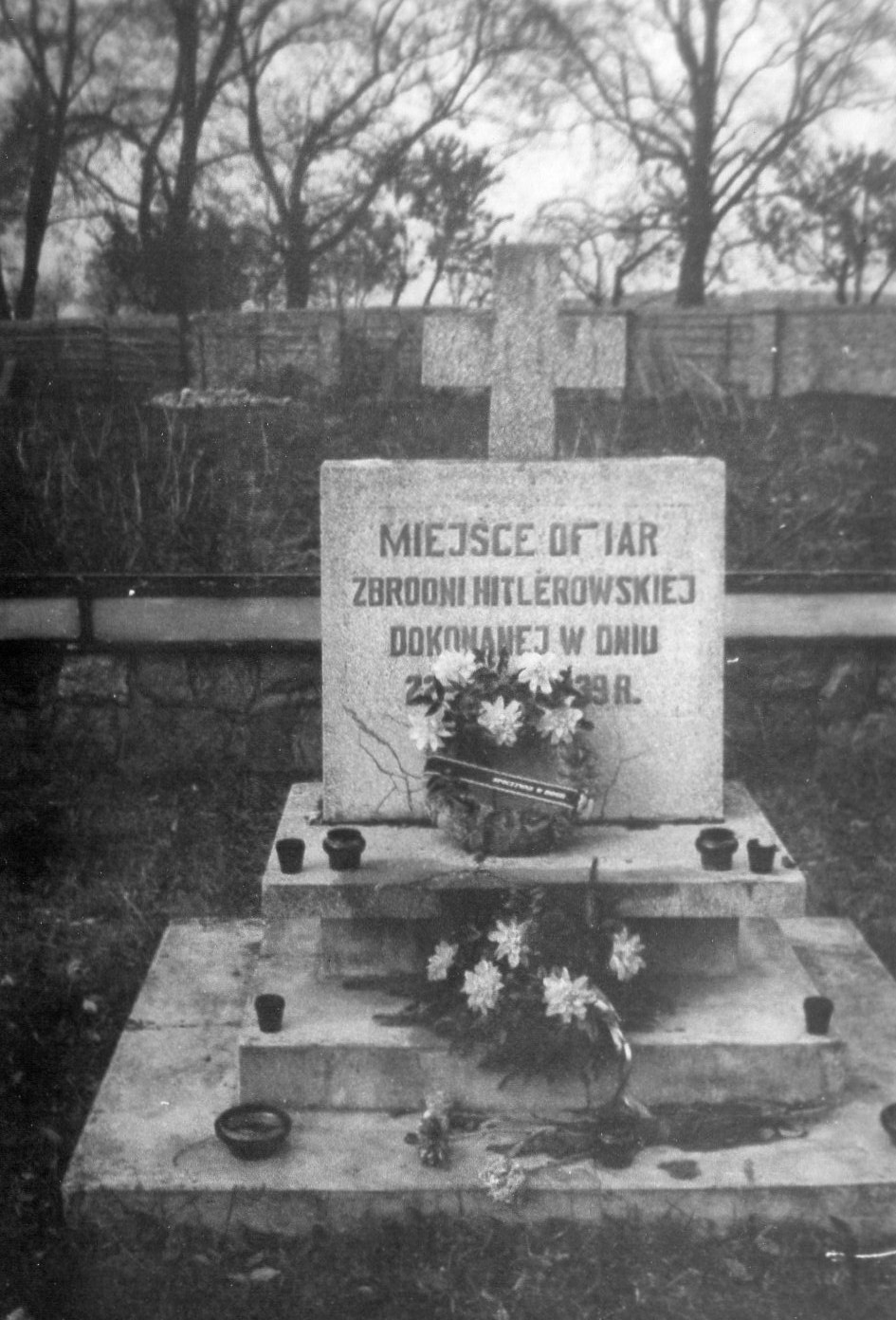 Sanktuarium w Górce Klaszt. List. 1991r.